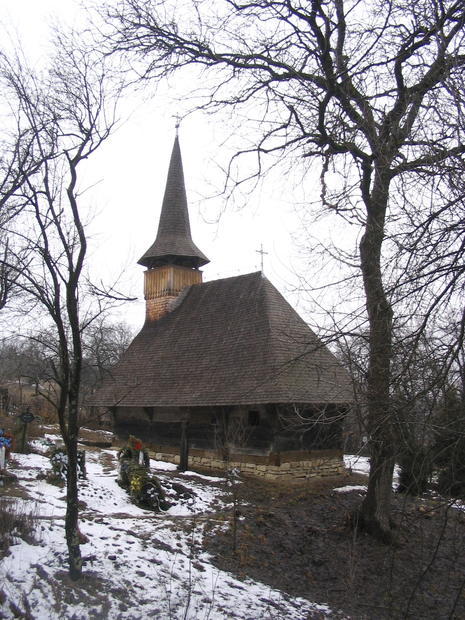 Biserica de lemn din Dobrin, Sălaj. Autor: Bogdan Ilieş Data: martie 2006 Categorie:Biserici de lemn din Sălaj (imagini)